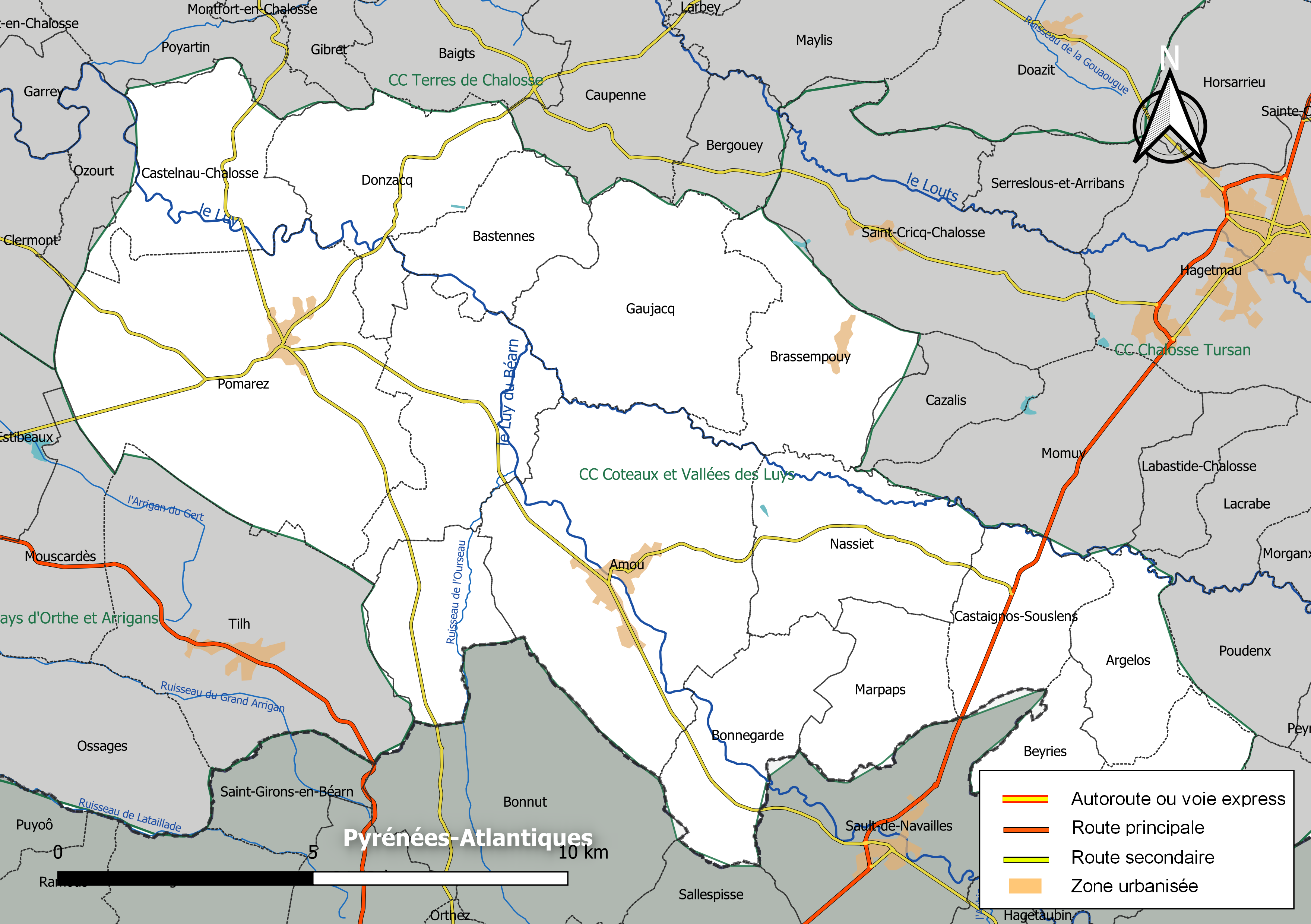 Carte géographique de la Communauté de communes Coteaux et Vallées des Luys, département des Landes, France. Composition au 1er janvier 2019.